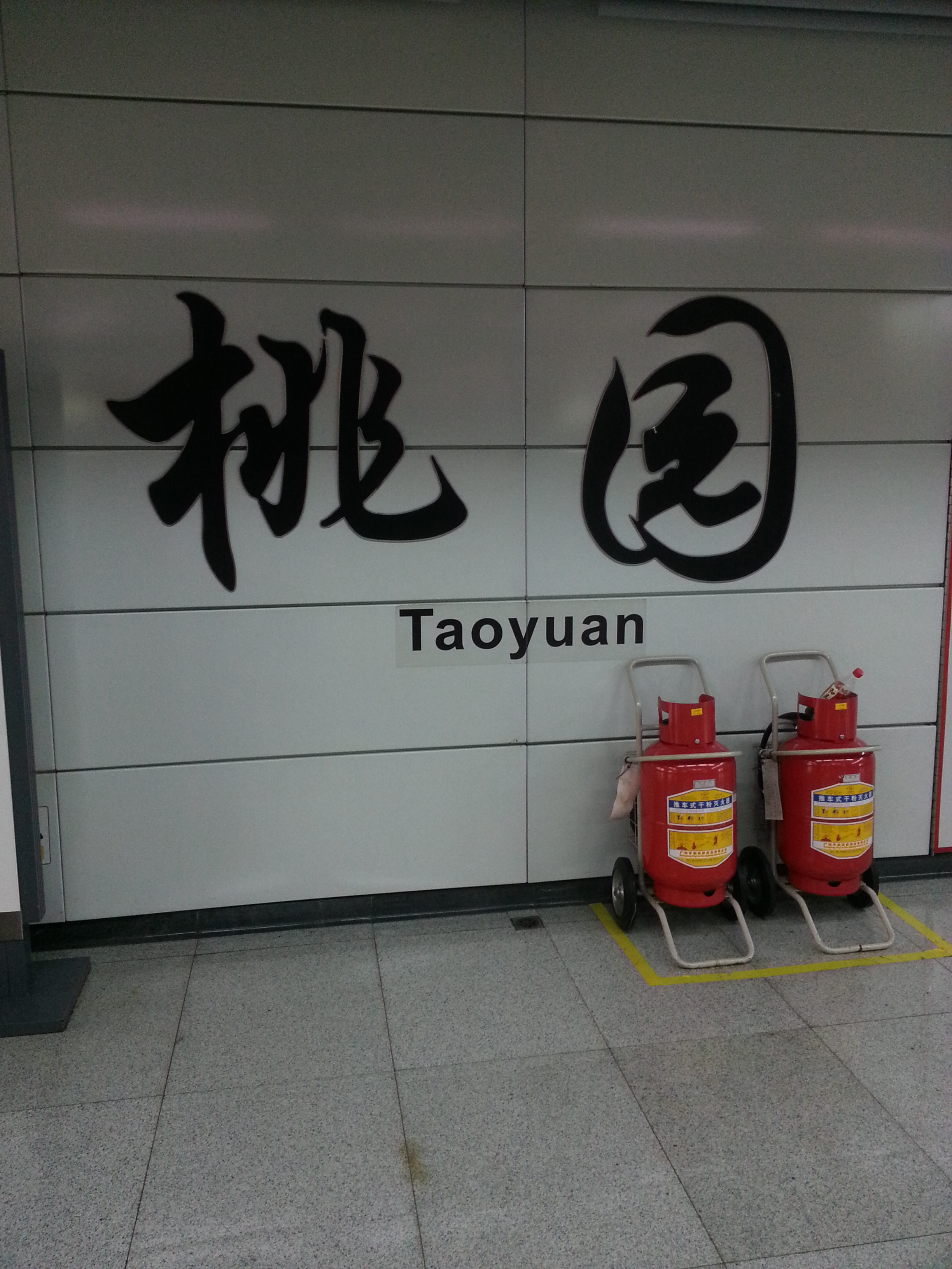 桃园站，书法站名。